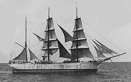 Barke "S.M.Admiral Tegetthoff, erbaut 1871 durch die Johann Tecklenborg-AH Geestemünde, 1899-1907 in Besitz von Schlubach & Co.